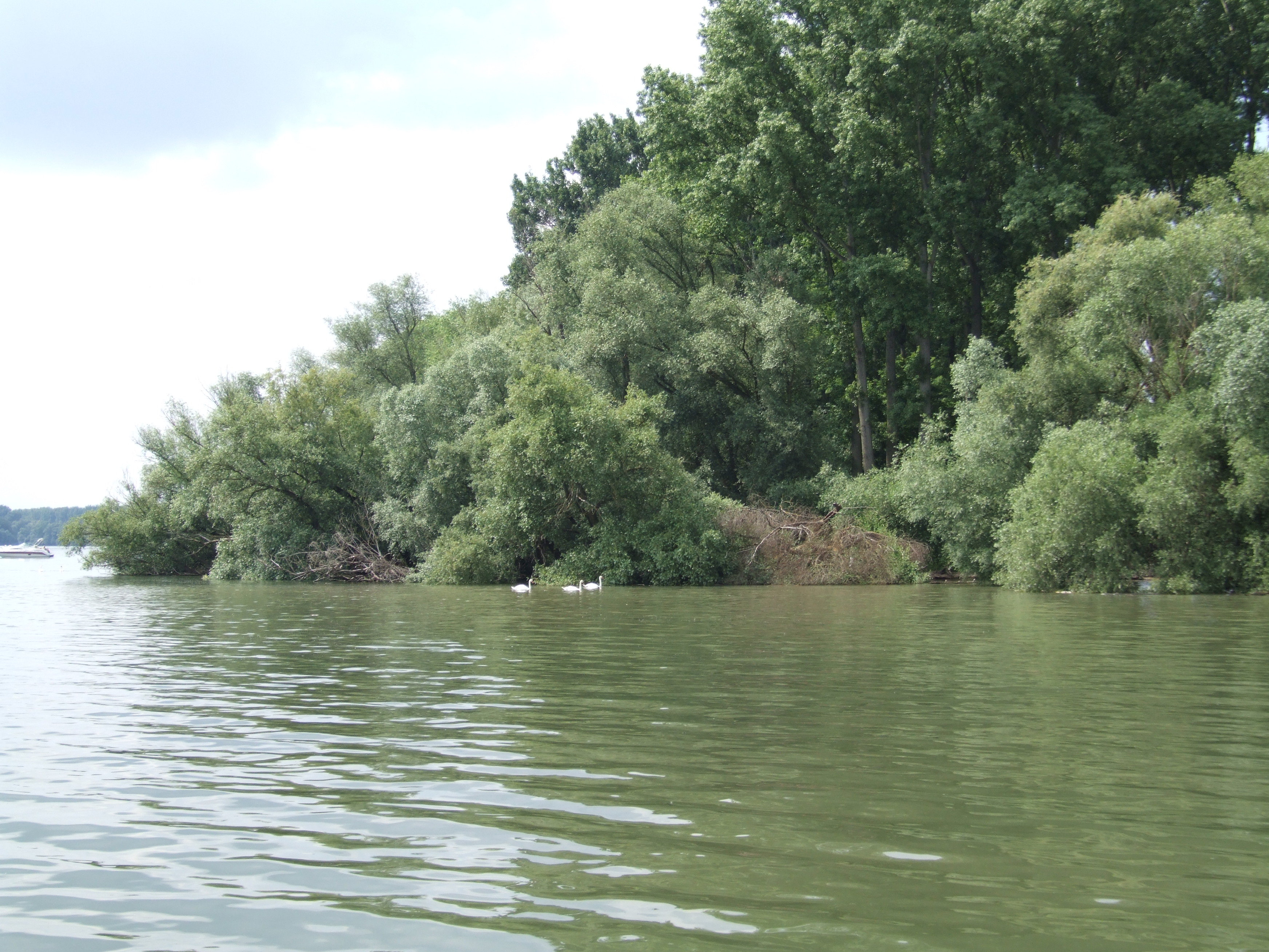 Blick auf die Weichholzaue der Insel Horn, Speyerer Auwald, von Berghäuser Altrhein aus. Es herrscht am 3. Juni 2007 leichtes Sommerhochwasser. Das Bild ist von der Rheinhäuser Fähre aus gemacht, kurz vorm anlegen.